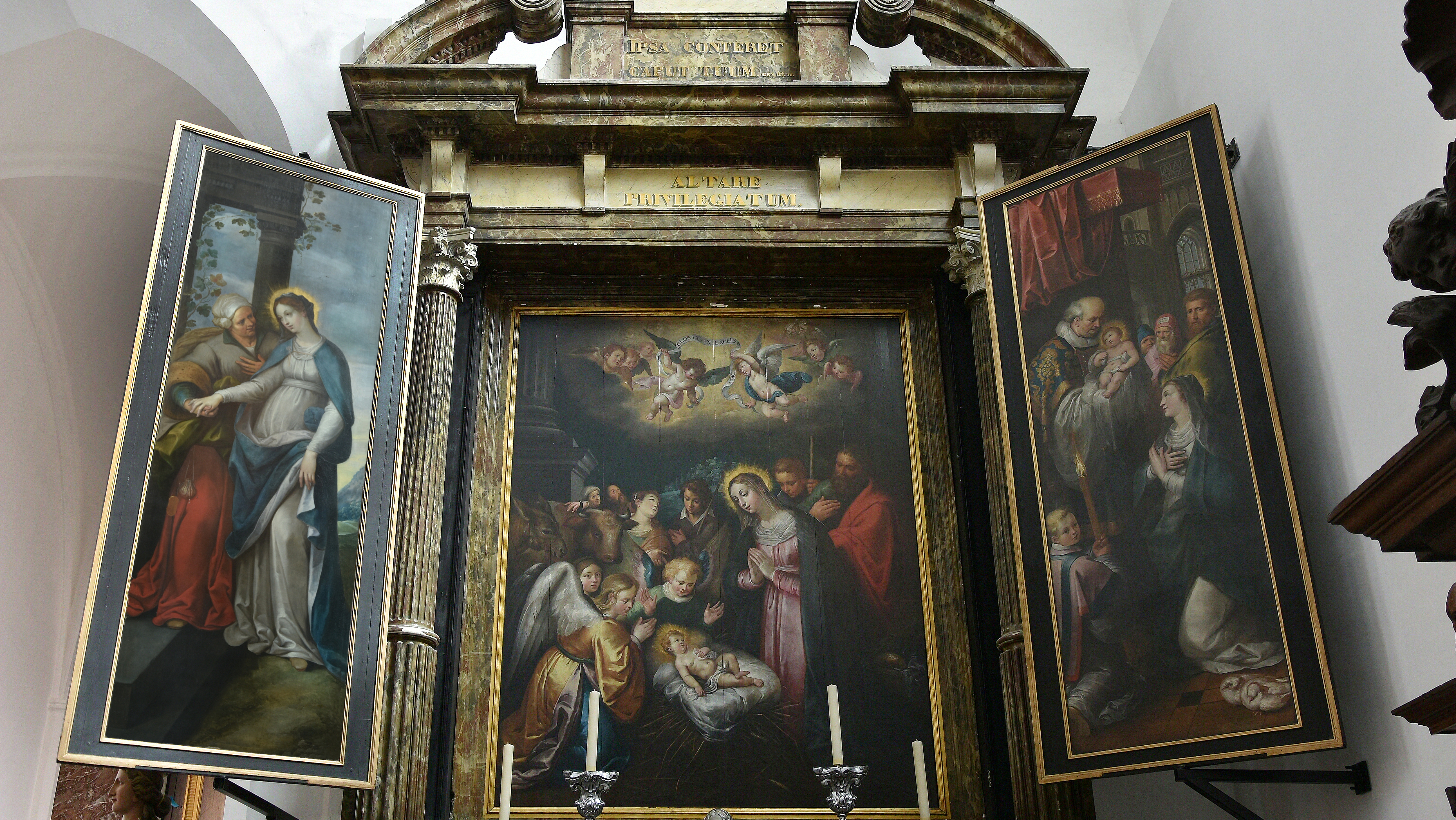 Ambrosius Francken (II) (1590–1632) Aanbidding door de herders (zuiderdwarsbeuk) Sint-Janskerk (Mechelen) 13-09-2018 This photo of movable heritage has been taken in the Flemish Region